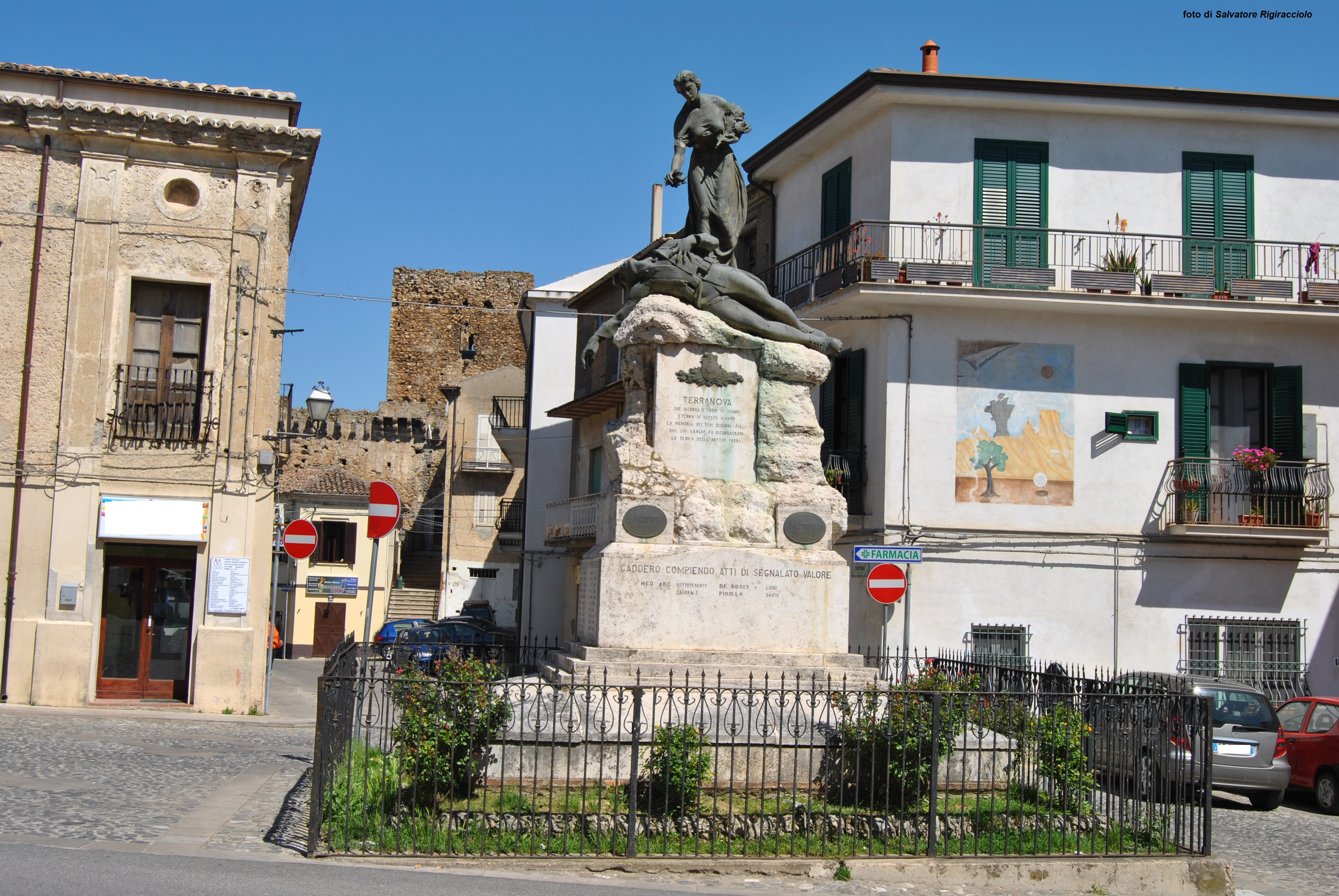 Monumento ai Caduti, foto scattata da Salvatore Rigiracciolo in data 28/04/2012.